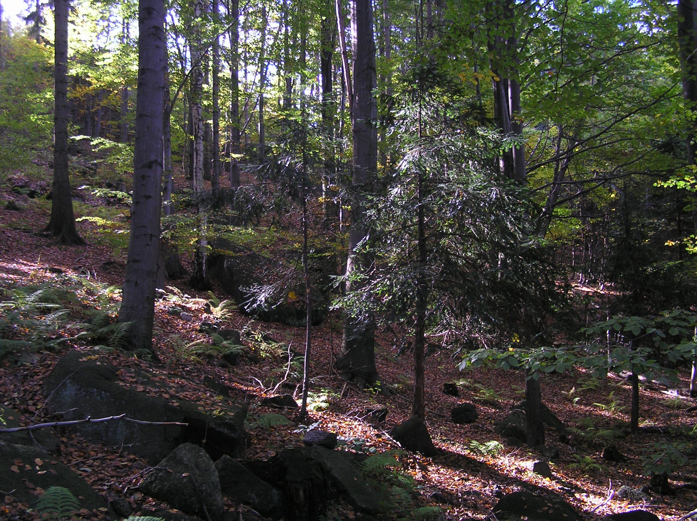 PP Pod Dračí skálou